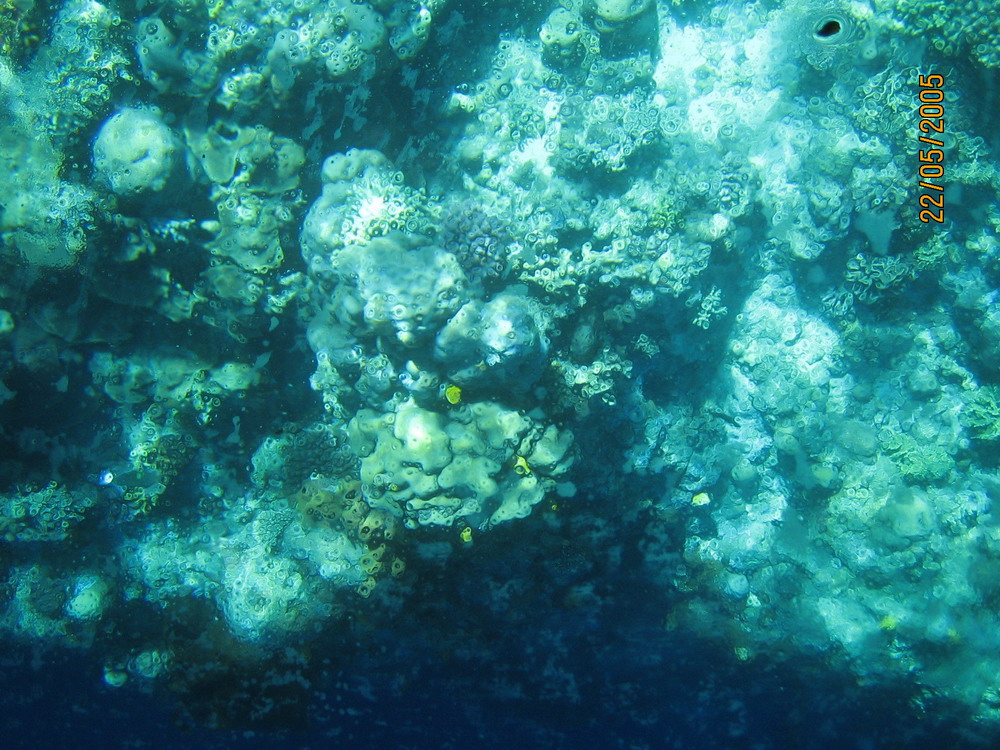 Bunaken marine park at North Sulawesi, Indonesia